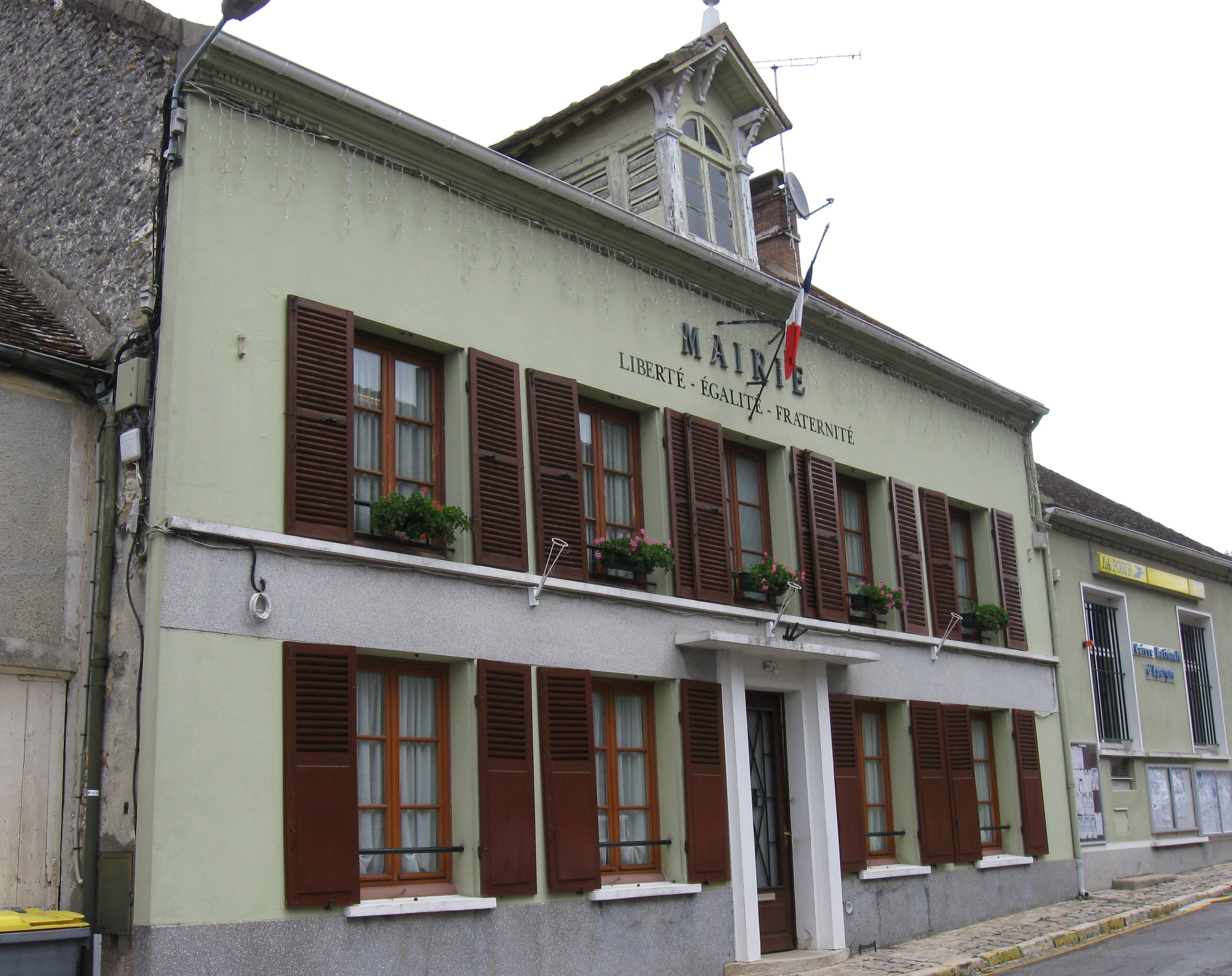 Mairie de Valence-en-Brie. (Seine-et-Marne, région Île-de-France).